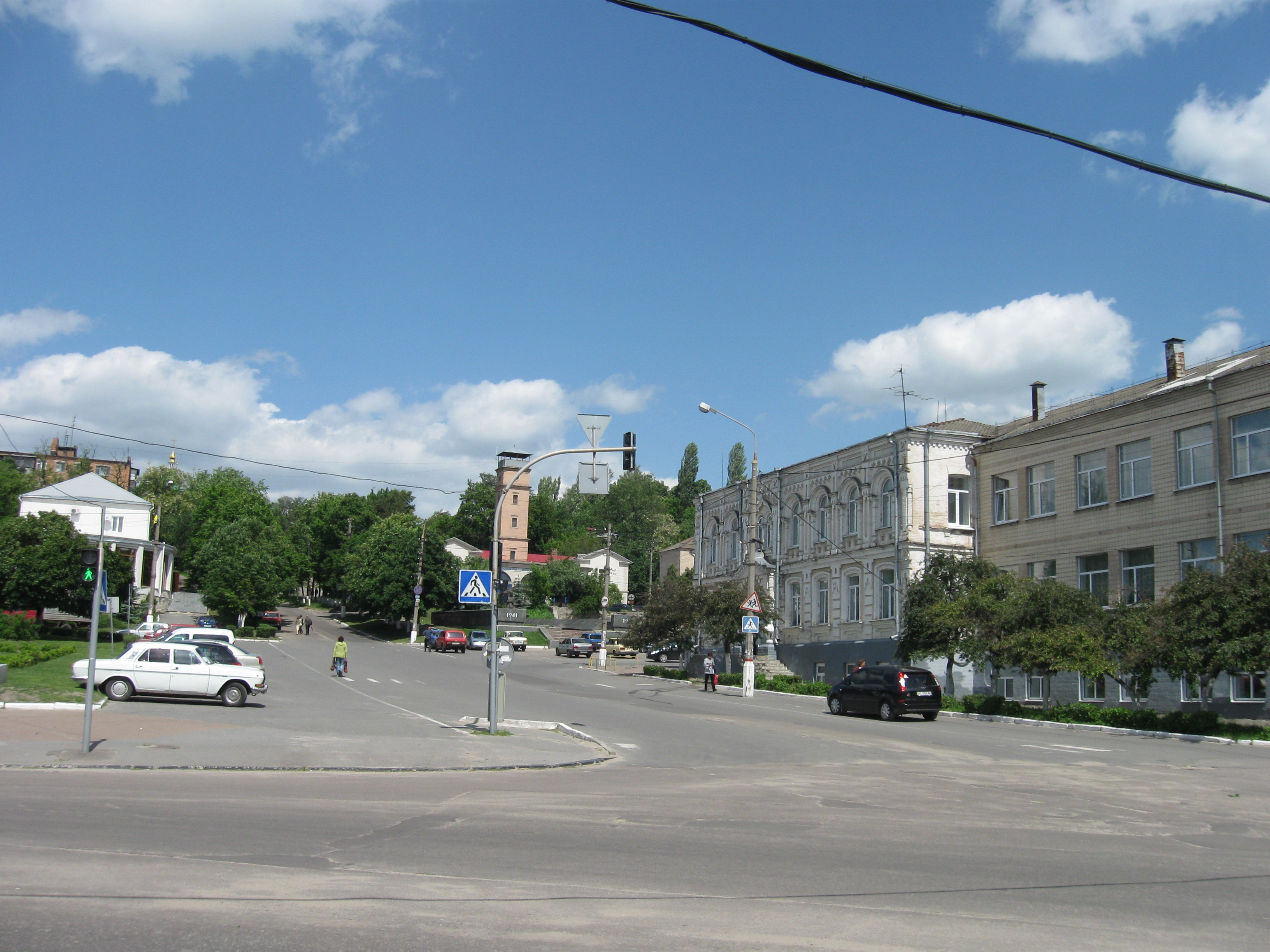 Vasiļkivas pilsētas cents